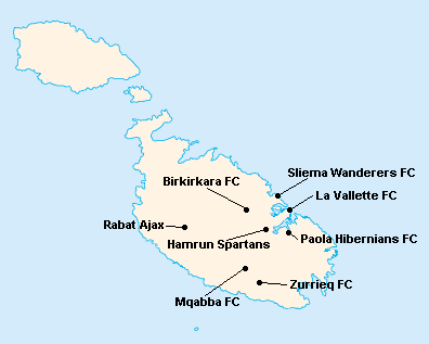 Répartition des clubs en Premier League Maltaise 1985-1986.